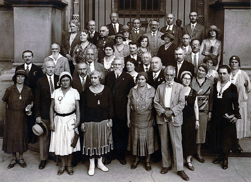 23. Esperanto-Weltkongress, Krakau 1931. Gruppenfoto einiger, vermutlich polnischer Teilnehmer, darunter Lidia und Felix Zamenhof (vorne 3. und 4.v.r.) und Odo Bujwid (6.v.r.)